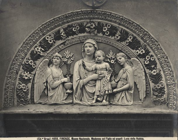 Giacomo Brogi - "Firenze - Museo Nazionale - Madonna col Figlio ed Angeli. Luca della Robbia". Catalogo numero 4655.